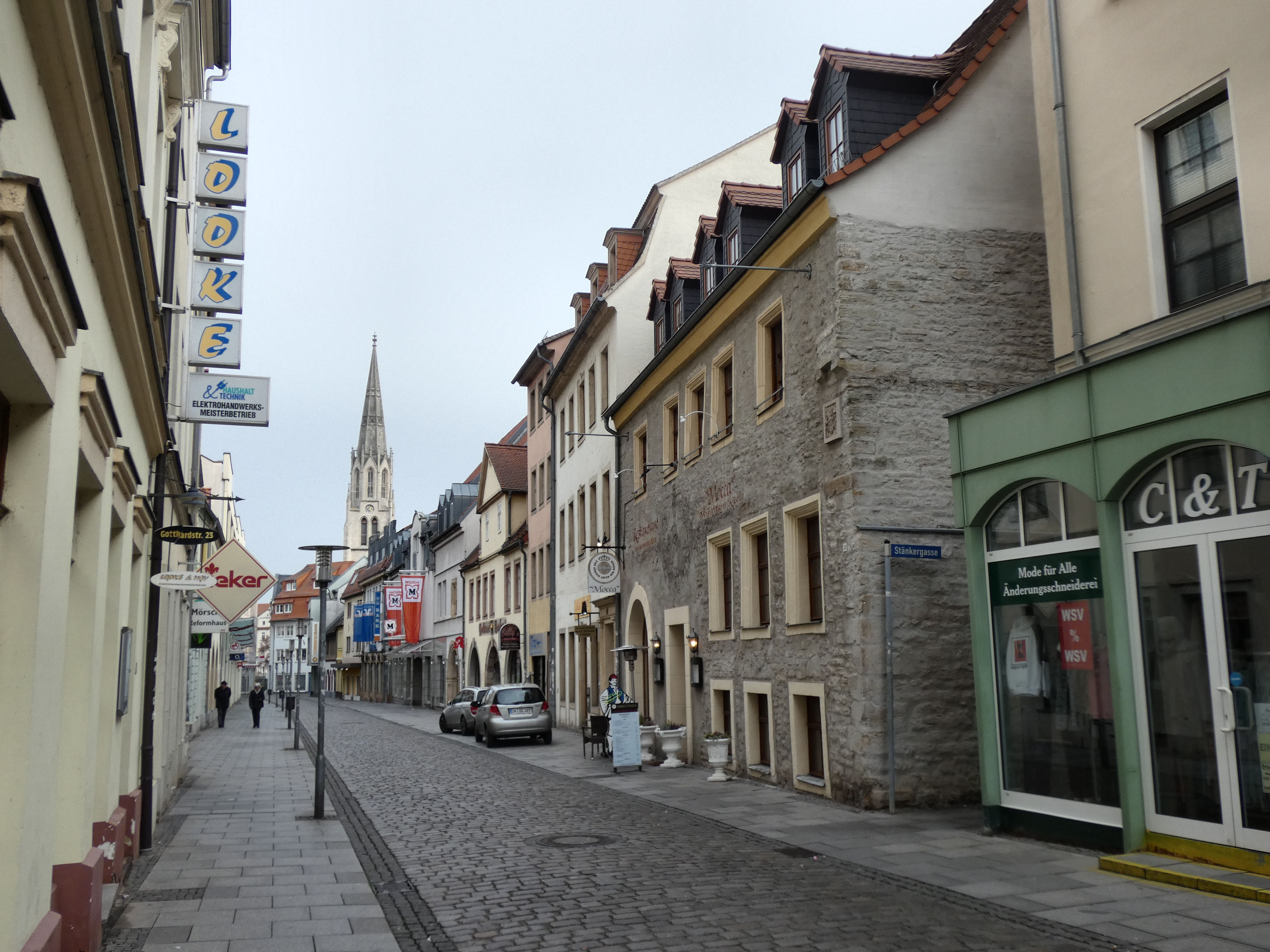 Gotthardstraße, Merseburg